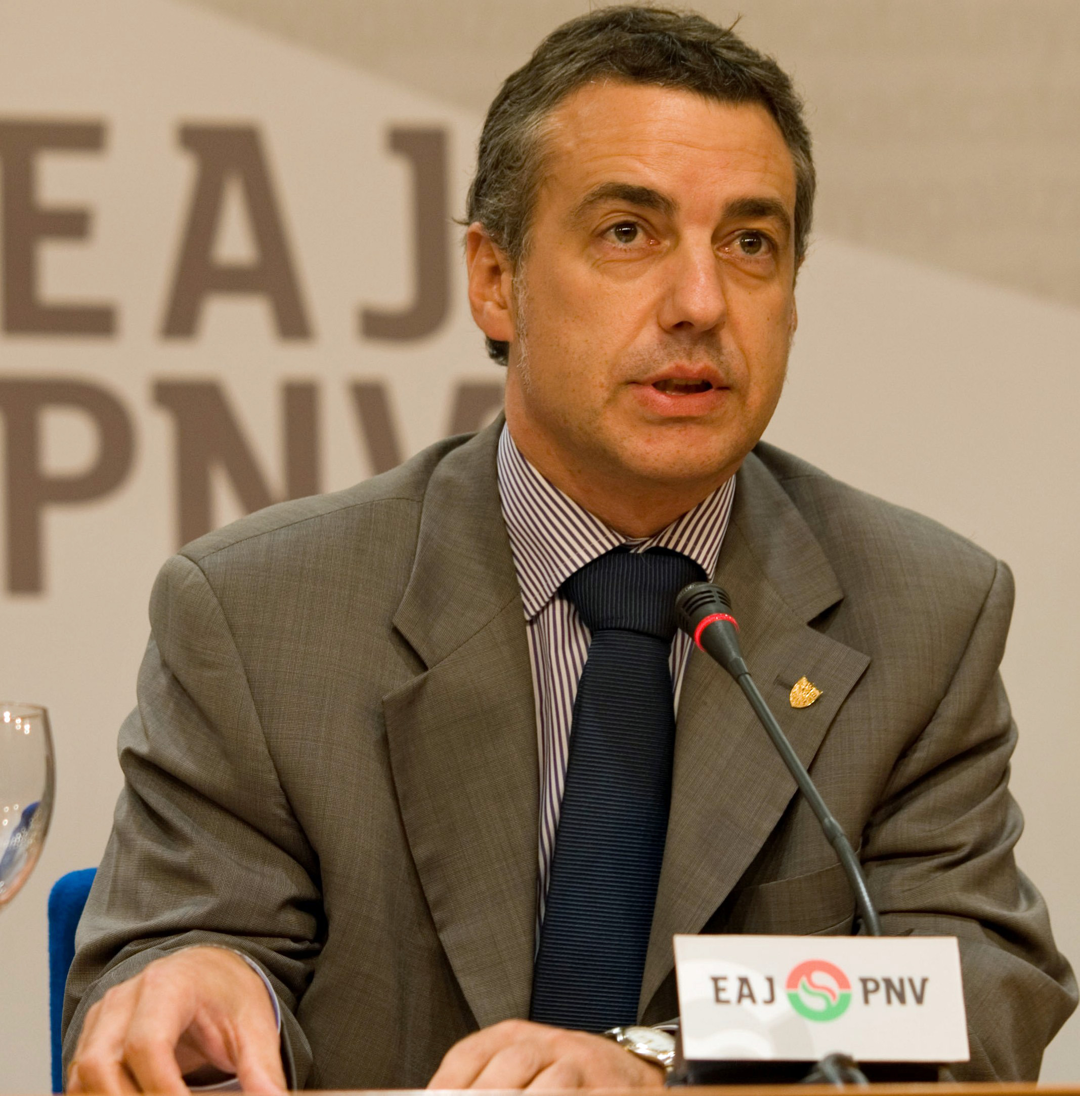 Fotografia de Iñigo Urkullu presidente del PNV (2007), sucediendo a Josu Jon Imaz